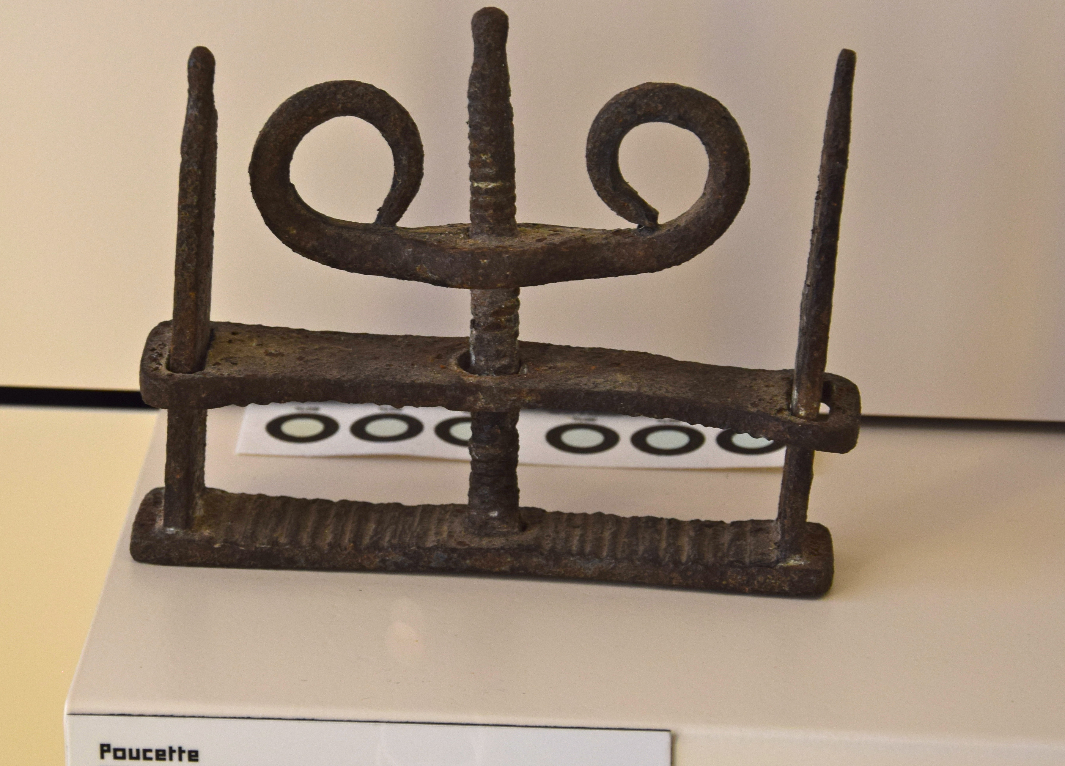 collection du musée Arkéos